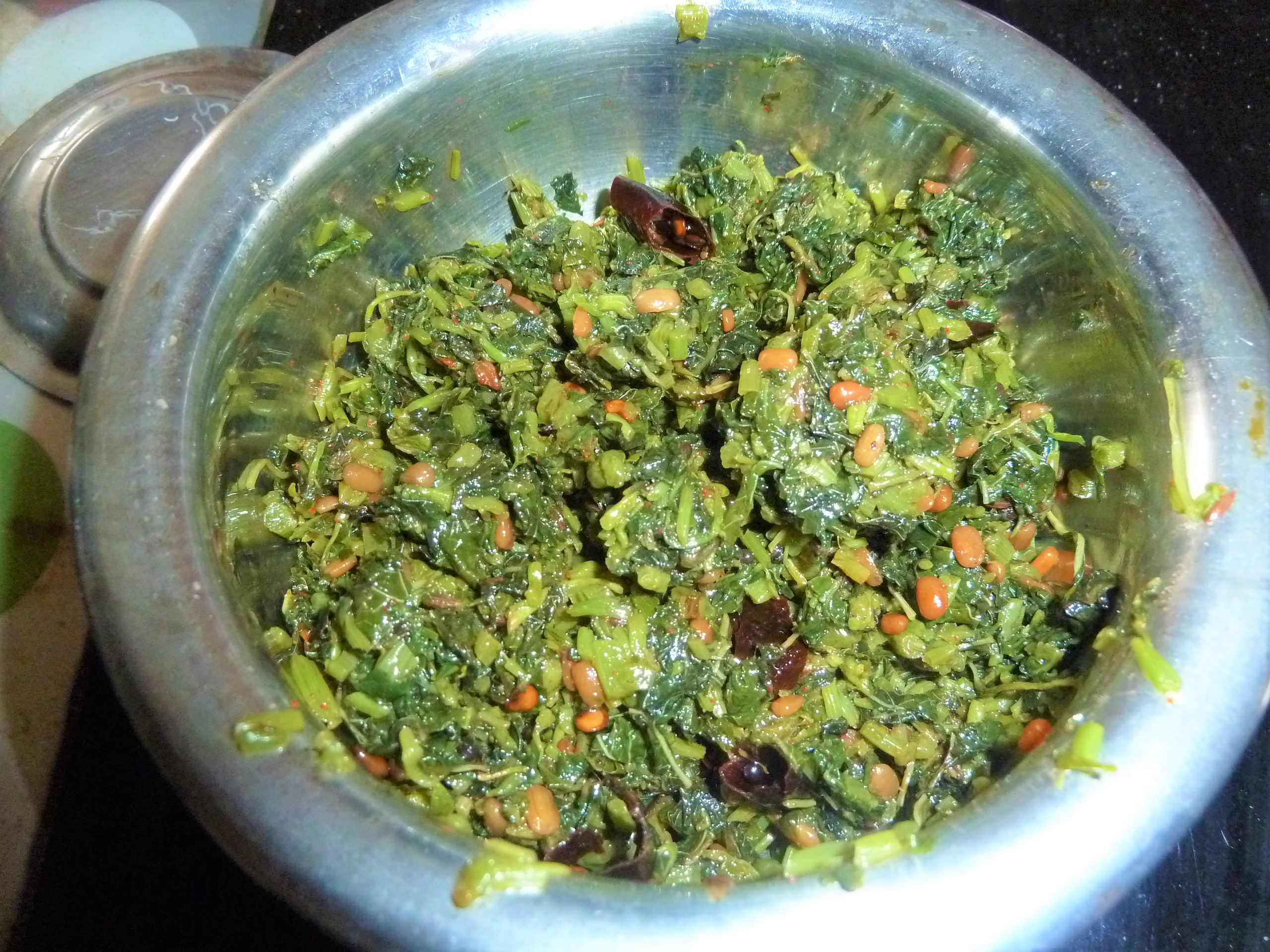 తోటకూర కూర